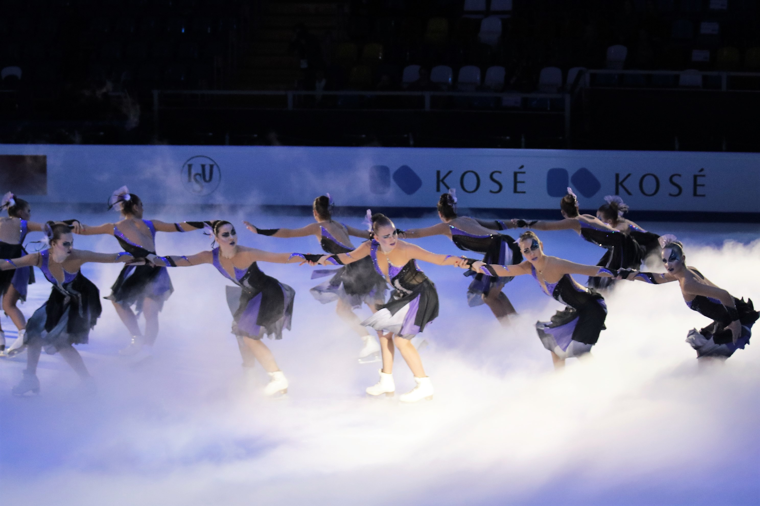 Команда синхронного катания "Парадиз" (Санкт-Петербург) на церемонии открытия чемпионата Европы по фигурному катанию 2018 в Москве.